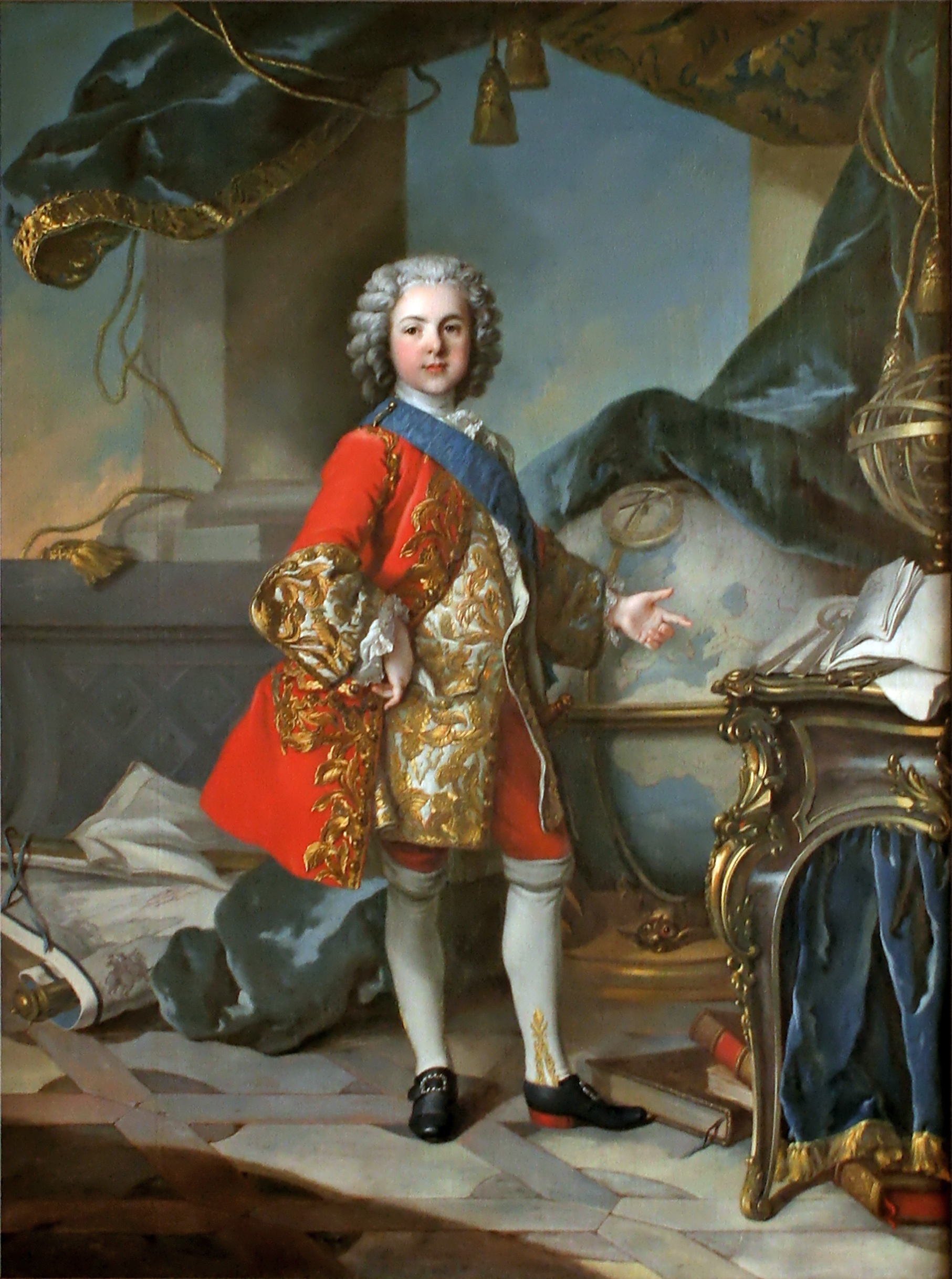 Louis de France, Dauphin fils de Louis XV, représenté âgé de 9 ans, dans un cabinet d'étude, près d'un globe terrestre et un traité des fortifications.